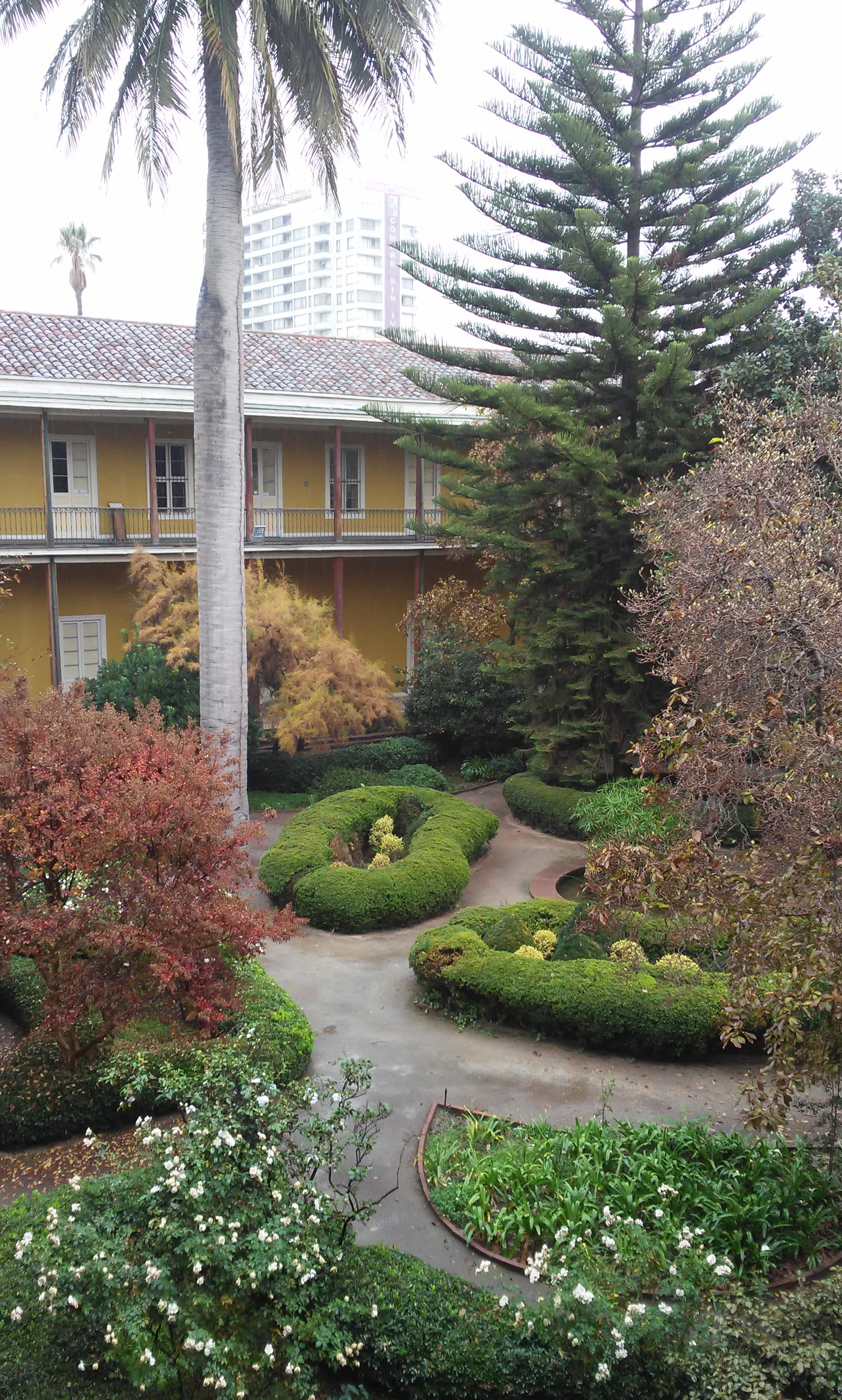 Patio principal "Los Padres" ubicado al interiro del Convento de la Recoleta Dominica